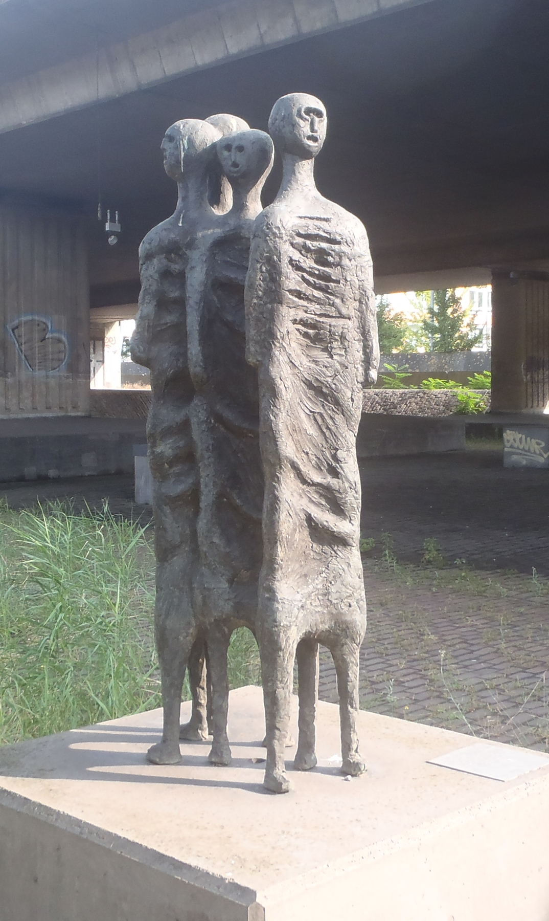 Rotterdam, Kleinpolder, Kleinpolderplein. Onbekend kunstwerk van Ru de Gier. The Netherlands. The photographical reproduction of this work is covered under the article 18 of the Dutch copyright law, which states that “it is not an infringement of copyright to reproduce and publish pictures of a work, as meant in article 10, first paragraph, under 6°[1] or of an architectural work as meant in article 10, first paragraph, under 8°[2], which are made to be permanently located in a public place, as long as the work is depicted as it is located in the public space. Where incorporation of a work in a compilation is concerned, not more than a few of the works of the same author may be included”. [1] drawings, paintings, works of architecture and sculpture, lithographs, engravings and the likes [2] drafts, sketches and three-dimensional works relating to architecture, geography, topography or other sciences Note that photographs are not included in Item 6. They are separately listed at Item 9 and are therefore not covered by FOP. See COM:CRT/Netherlands#Freedom of panorama for more information. .